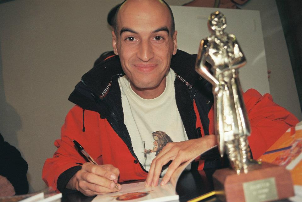 En el año 2009 Pau recibió el Premio Haxtur al mejor humorista gráfico en el Salón Internacional del cómic del Principado de Asturias